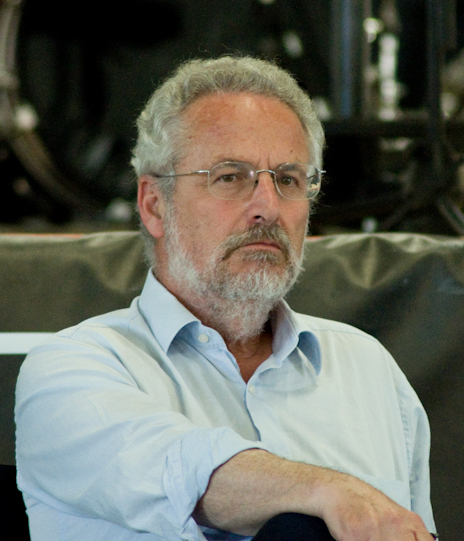 Maurizio Pallante a Cintello (VE) nel giugno 2012